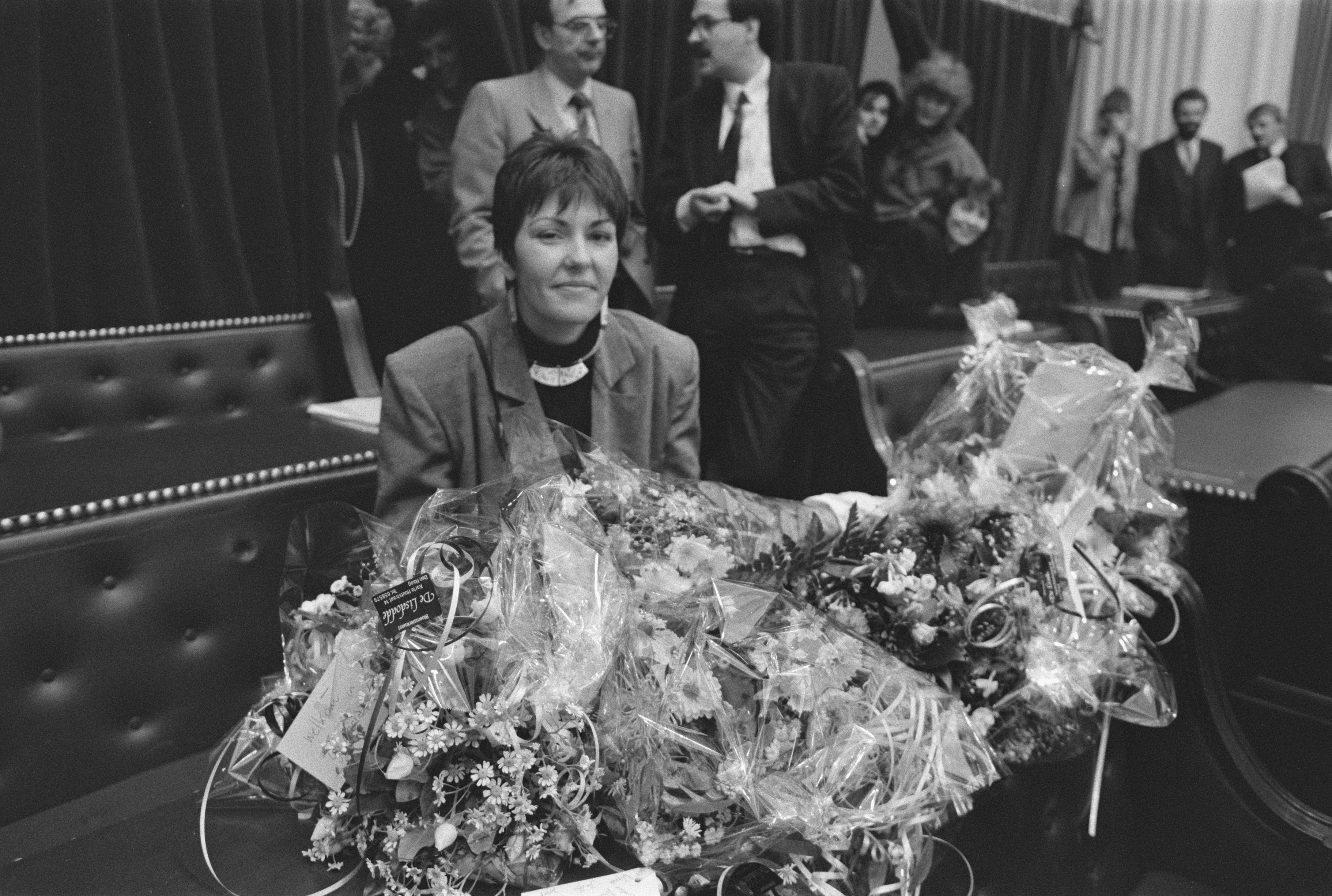 Collectie / Archief : Fotocollectie Anefo Reportage / Serie : [ onbekend ] Beschrijving : Margot Vliegenthart (PvdA) beedigd in Tweede Kamer Datum : 17 november 1987 Trefwoorden : beedigingen, politiek Instellingsnaam : PvdA Fotograaf : Rob Croes / Anefo Auteursrechthebbende : Nationaal Archief Materiaalsoort : Negatief (zwart/wit) Nummer archiefinventaris : bekijk toegang 2.24.01.05 Bestanddeelnummer : 934-1304